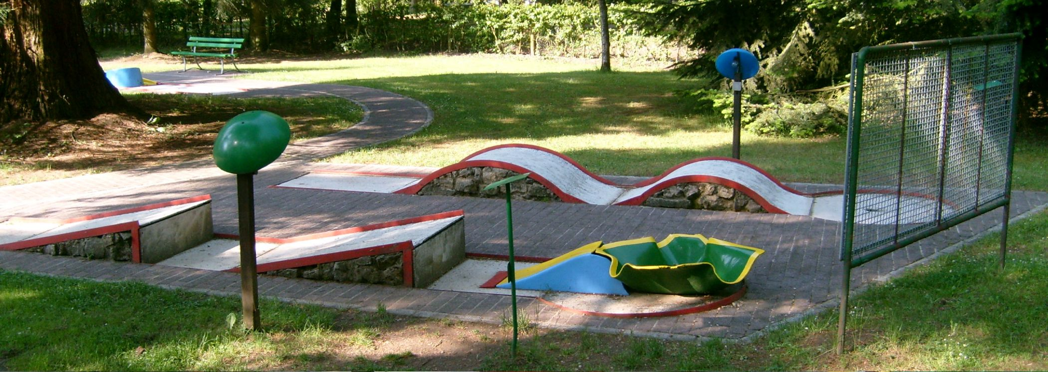 De Minigolf zu Bäerdref.